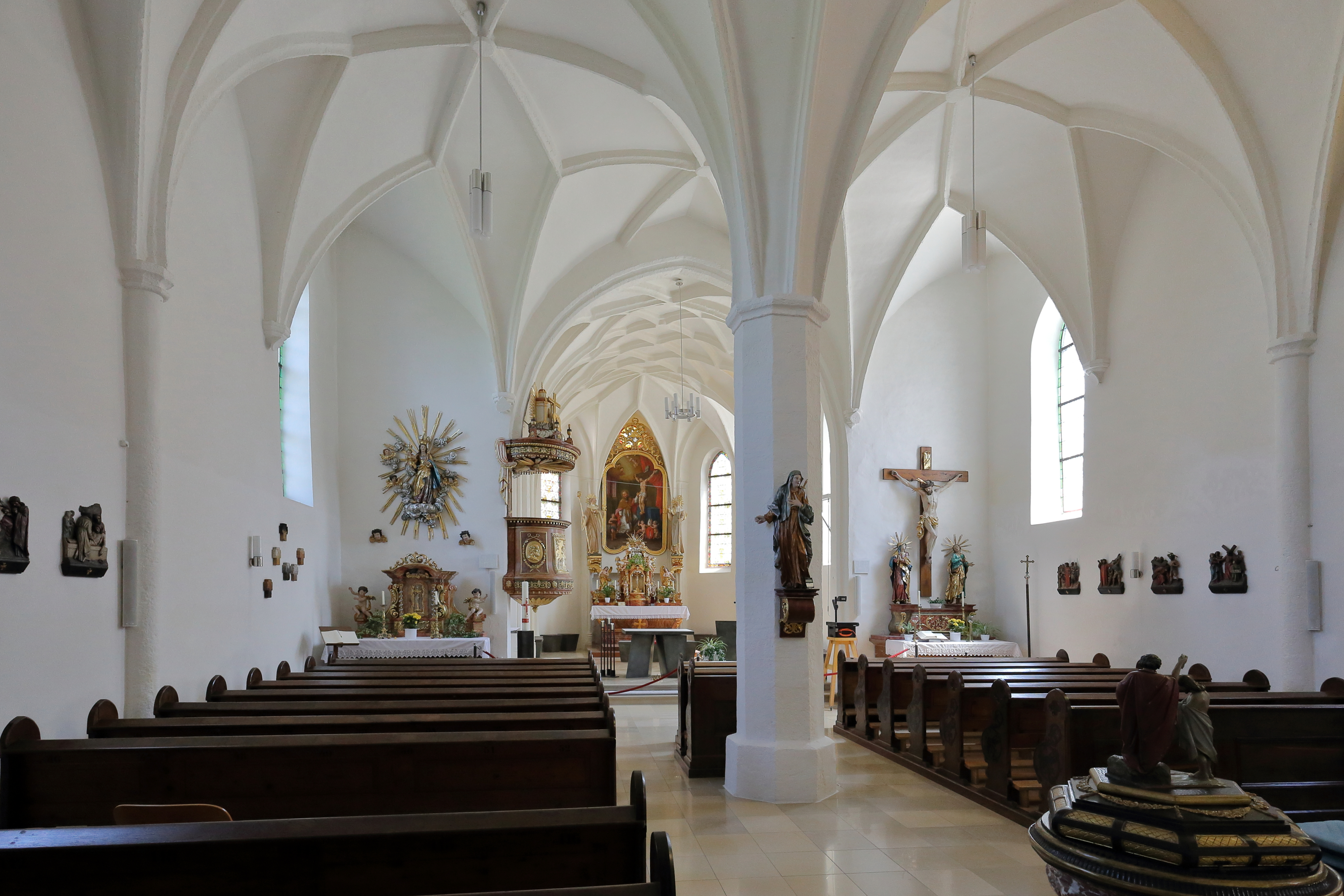 Innenansicht Richtung Altarraum der katholischen Pfarrkirche St. Willibald in der oberösterreichischen Gemeinde St. Willibald.